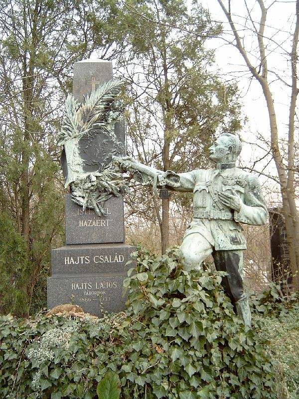 Hajts Lajos sírja (Krisztián Sándor, 1934.) [1] Budapesten. Új köztemető: 29/2-1-22-K.